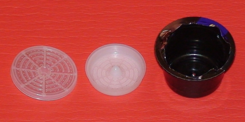 Innenleben der Caffisimo Kapseln